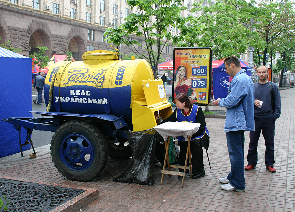 kvass street vendor